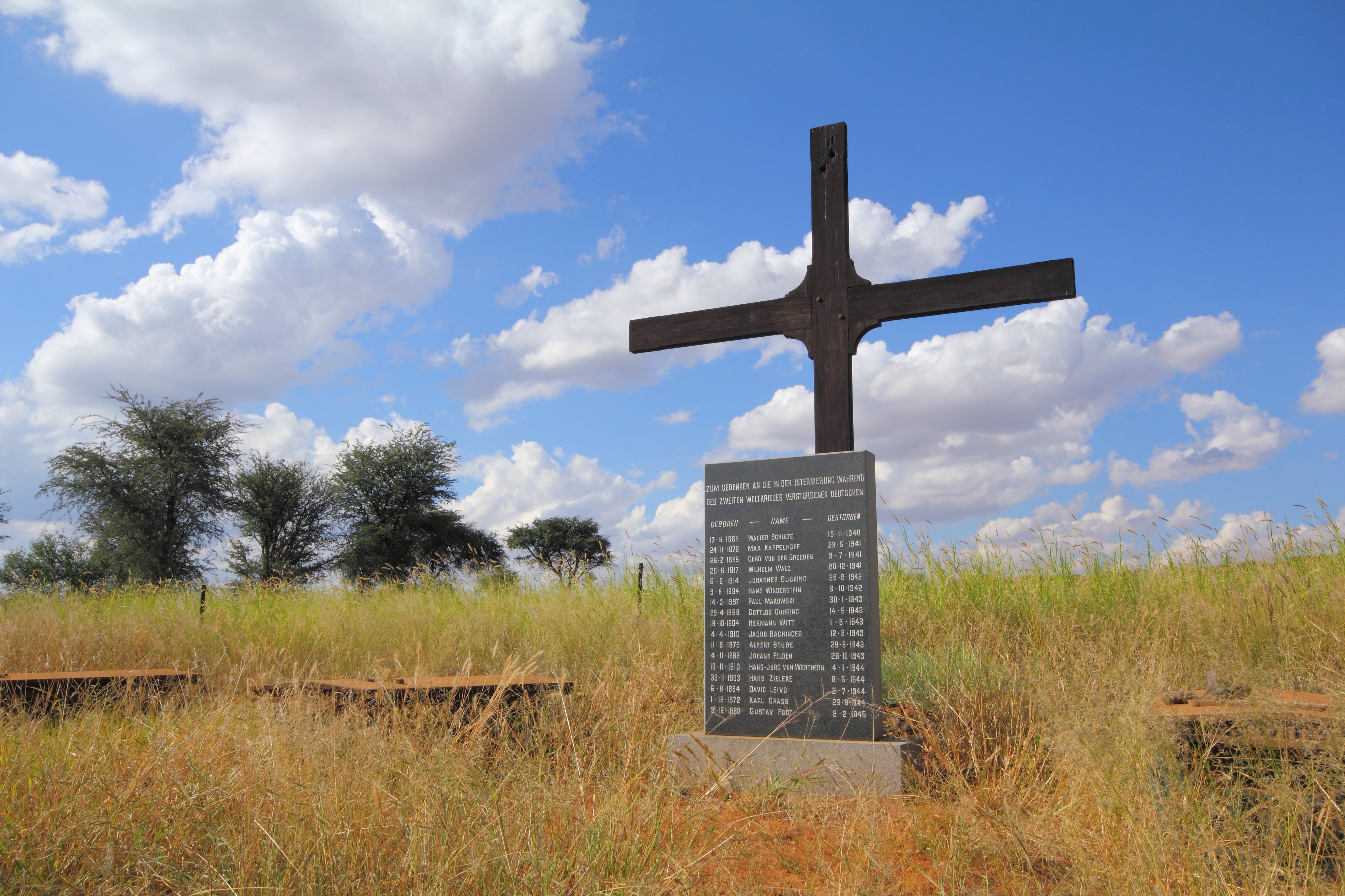 Holzkreuz und Namenstafel zum Gedenken an die während der Internierungszeit im Lager Andalusia Verstorbenen.